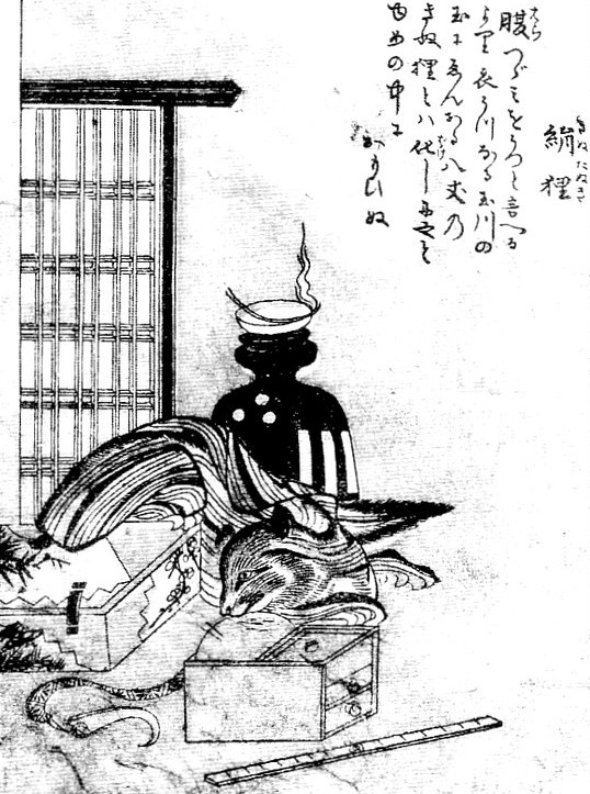 Kinu-tanuki (絹狸) from the Gazu Hyakki Tsurezure Bukuro (百器徒然袋)